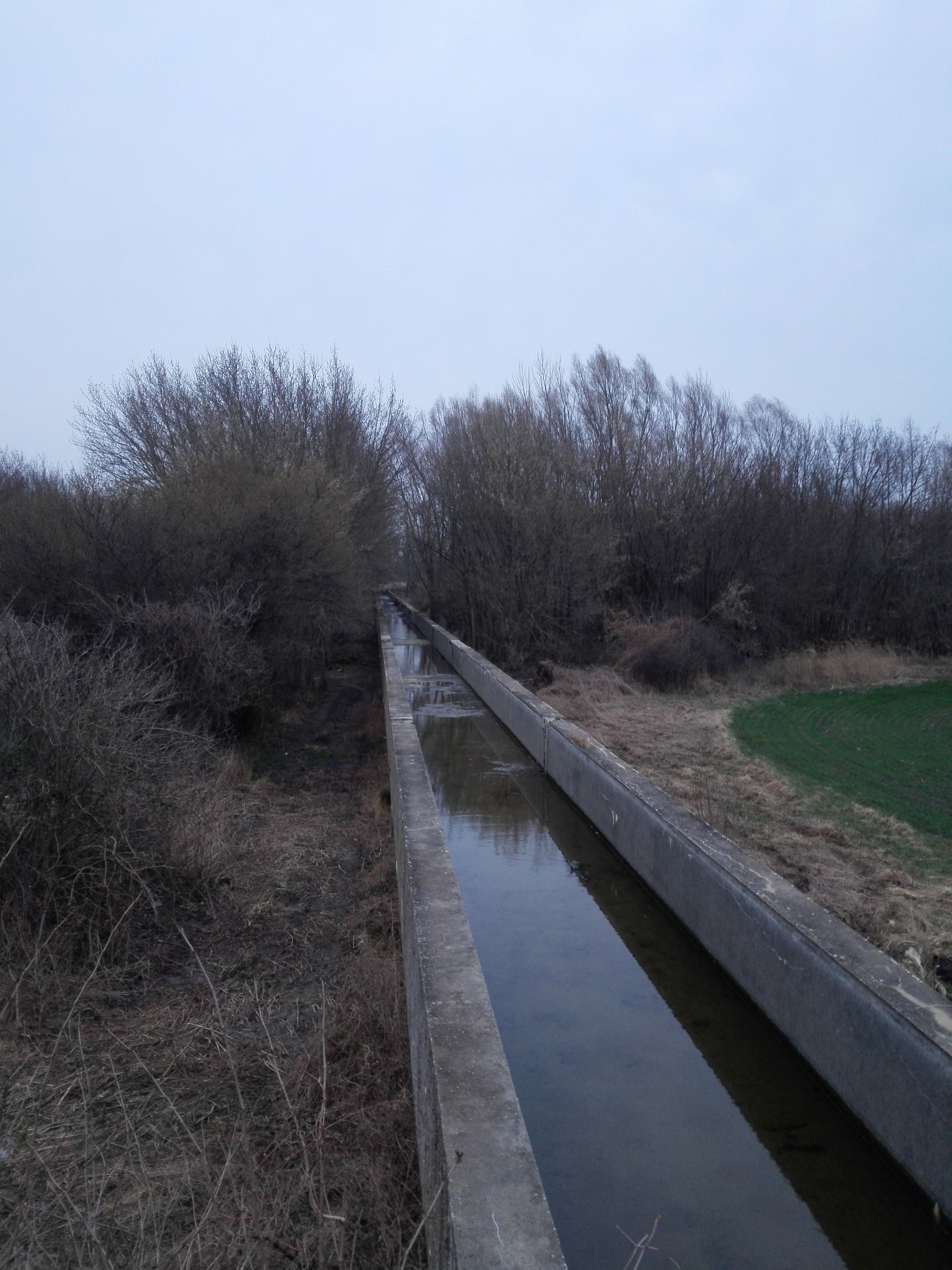 Kanál Krhovice – Hevlín